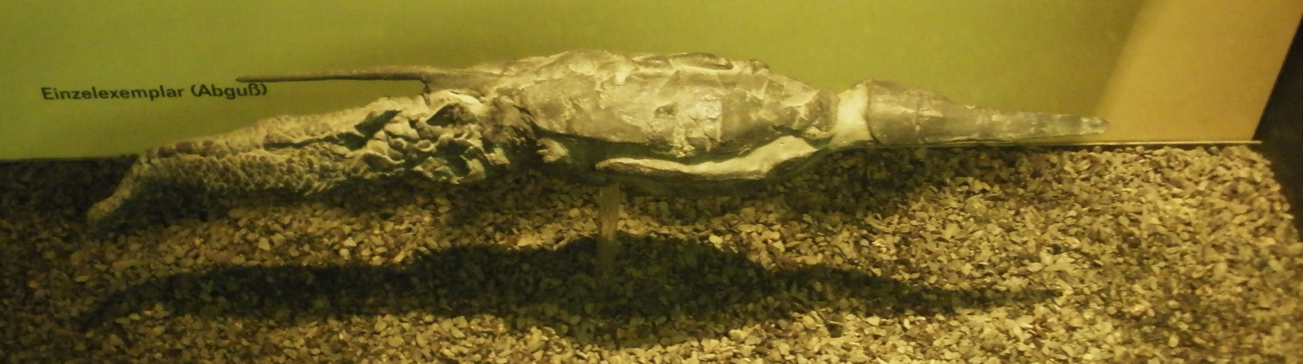 Fossil of Rhinopteraspis, an extinct agnathan- Took the photo at Senckenberg Museum of Frankfurt